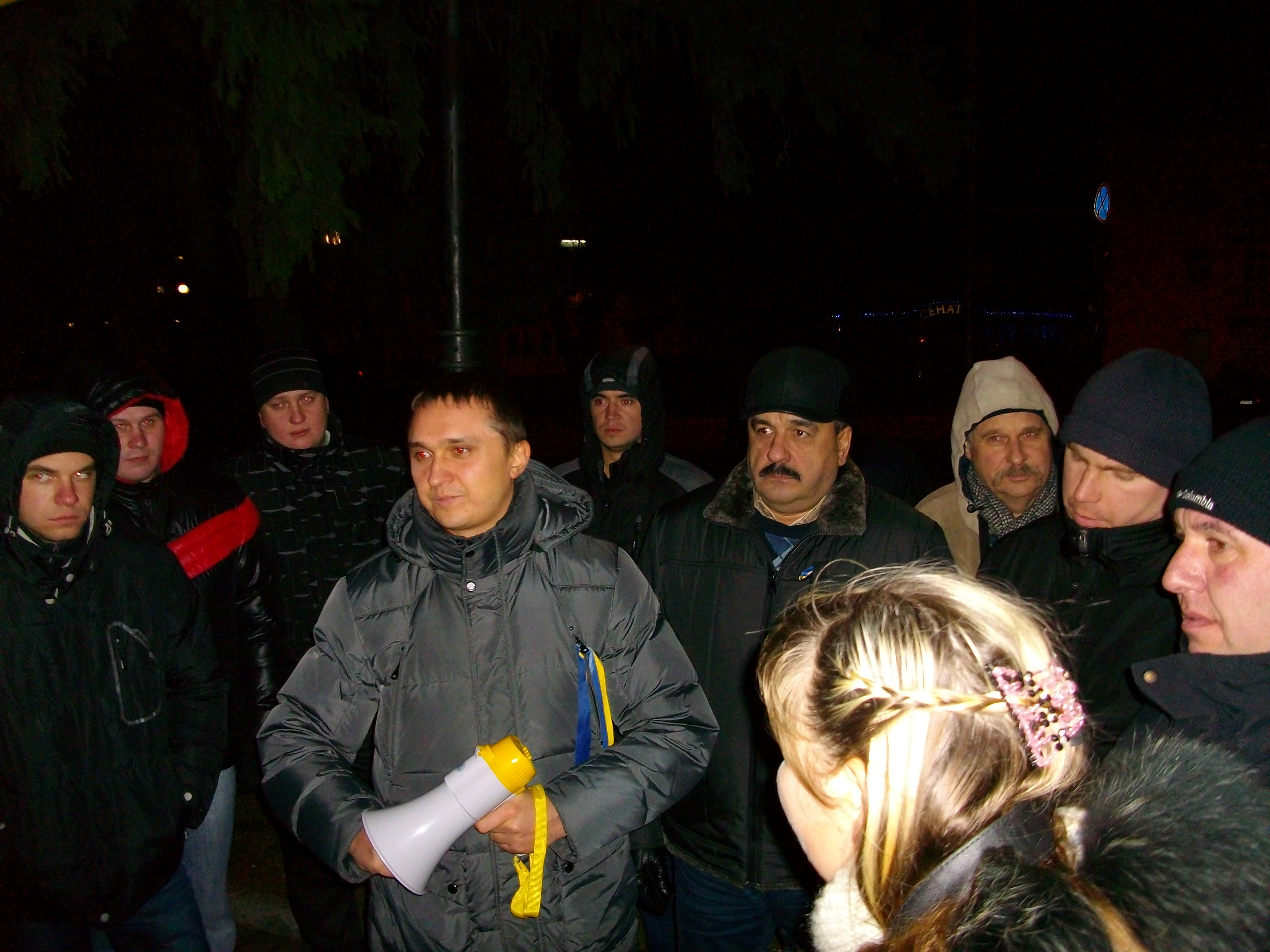 Олександр Кодола (один з організаторів та керівників Чернігівського обласного Штабу національного спротиву) координує акцію протесту, Чернігівський Євромайдан